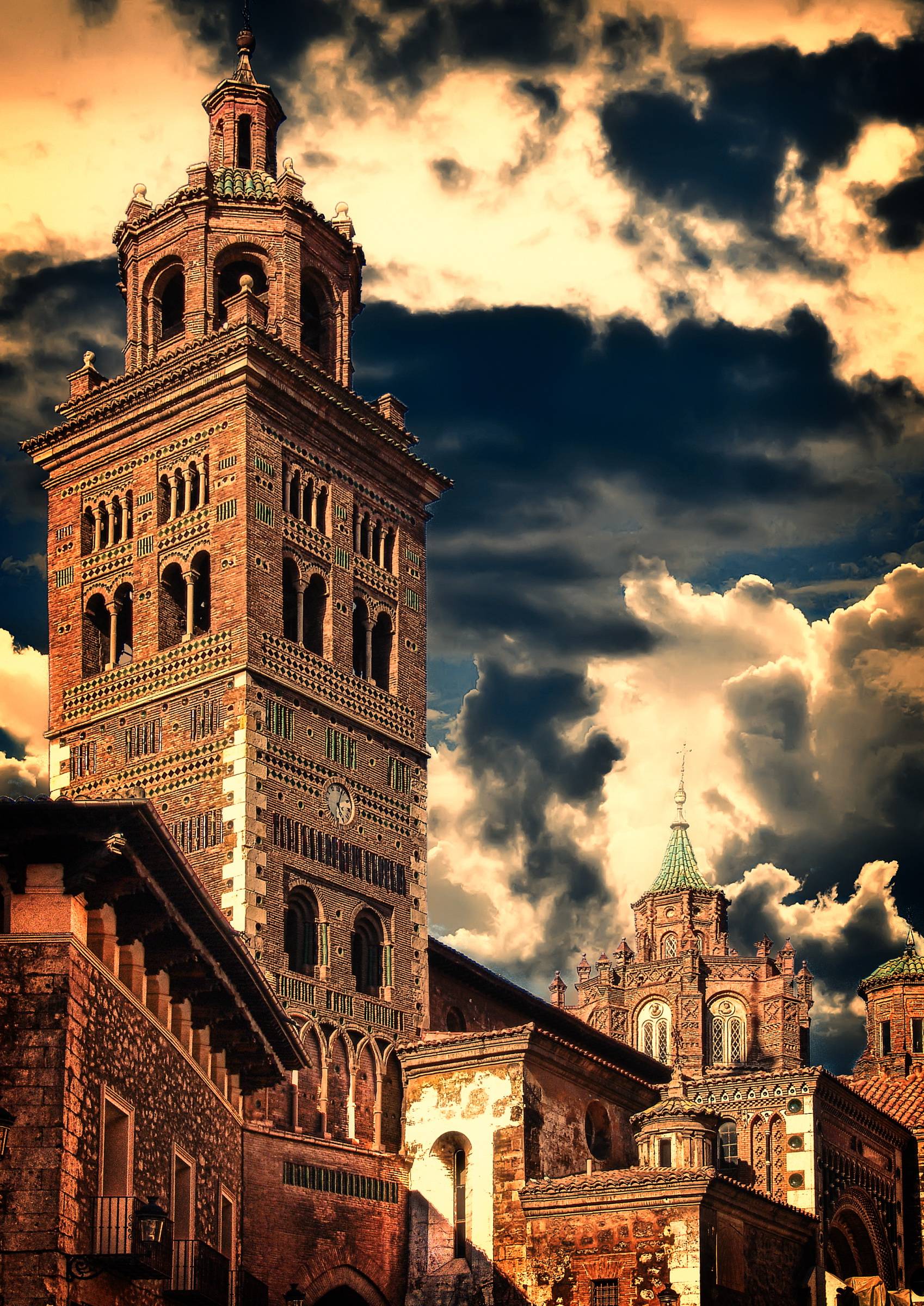 La Catedral de Teruel tiene su origen en la iglesia de Santa María de Mediavilla, que comenzó a edificarse en estilo románico en 1171 y se concluyó con la erección de la torre mudéjar en 1257. En la segunda mitad del siglo XIII, el alarife morisco Juzaff, reestructura la antigua obra románica y dota al edificio de tres naves mudéjares de mampostería y ladrillo, que mejoran y elevan la estructura románica del siglo XII. En el mismo estilo gótico-mudéjar, ya en el siglo XIV se sustituyeron los ábsides románicos por otros, como se puede apreciar en la cabecera de la capilla mayor. Se redujo con ello a la mitad el número de soportes, lo que dio una mayor luminosidad y espaciosidad a las naves de arcos apuntados. También los muros fueron recrecidos. En 1423, ya con el aspecto mudéjar con que, en lo fundamental, conocemos el templo actualmente, el pontífice aragonés Benedicto XIII, el llamado «Papa Luna» la elevó al rango de Colegiata. Ya en estilo plateresco-mudéjar, fue construido en 1538 el cimborrio de la nave central, obra de Martín de Montalbán. Fue edificado de planta octogonal sobre trompas y presenta en su exterior ventanas ajimezadas con decoraciones platerescas. Más tarde, en 1587, con la creación de la diócesis de Teruel, fue promovida a Catedral y consagrada como tal. Por último en 1909 se aborda la edificación de la fachada en estilo neomudéjar, obra de Pablo Monguió.